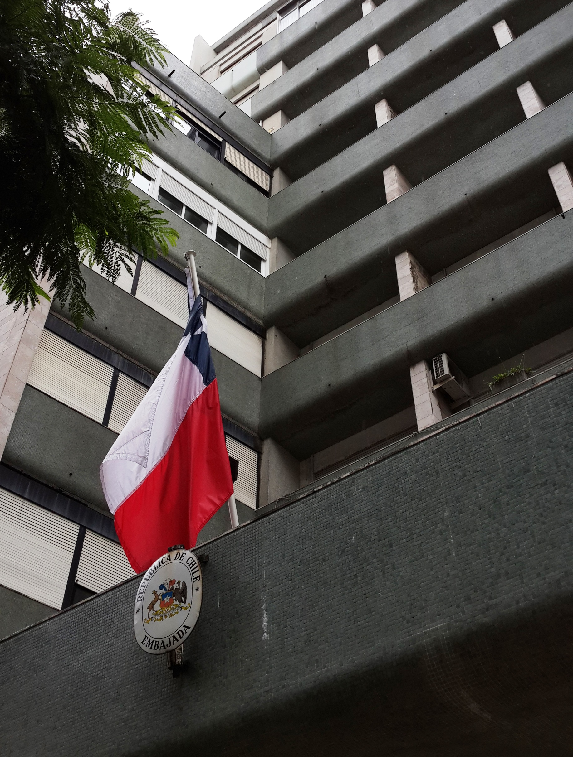 Embajada de Chile en Portugal